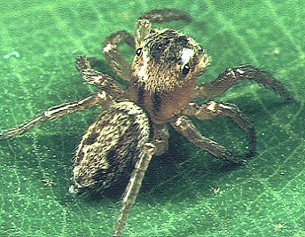 female Hasarius adansoni from Okinawa.